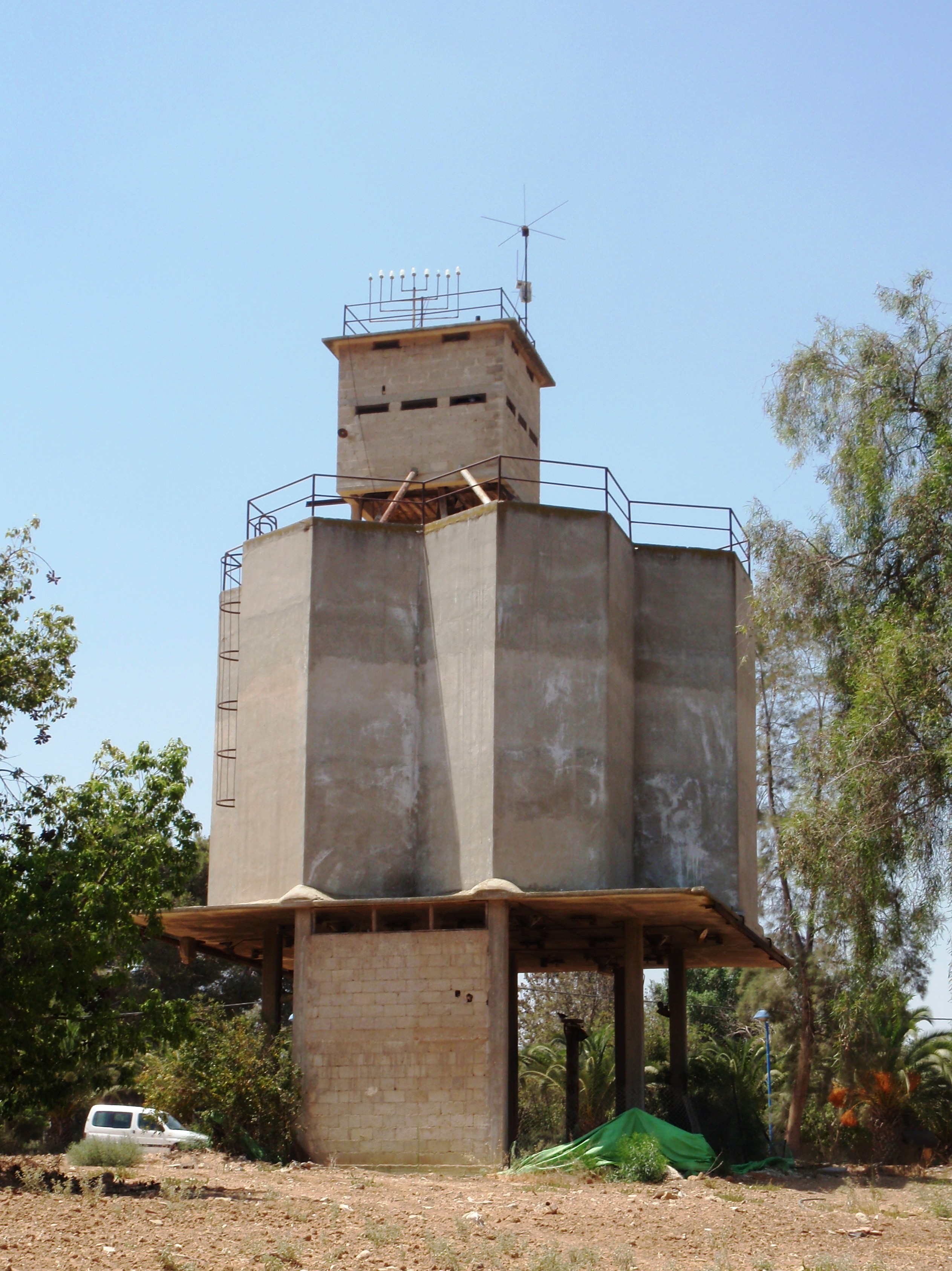 Moshavim תקומה מגדל המים